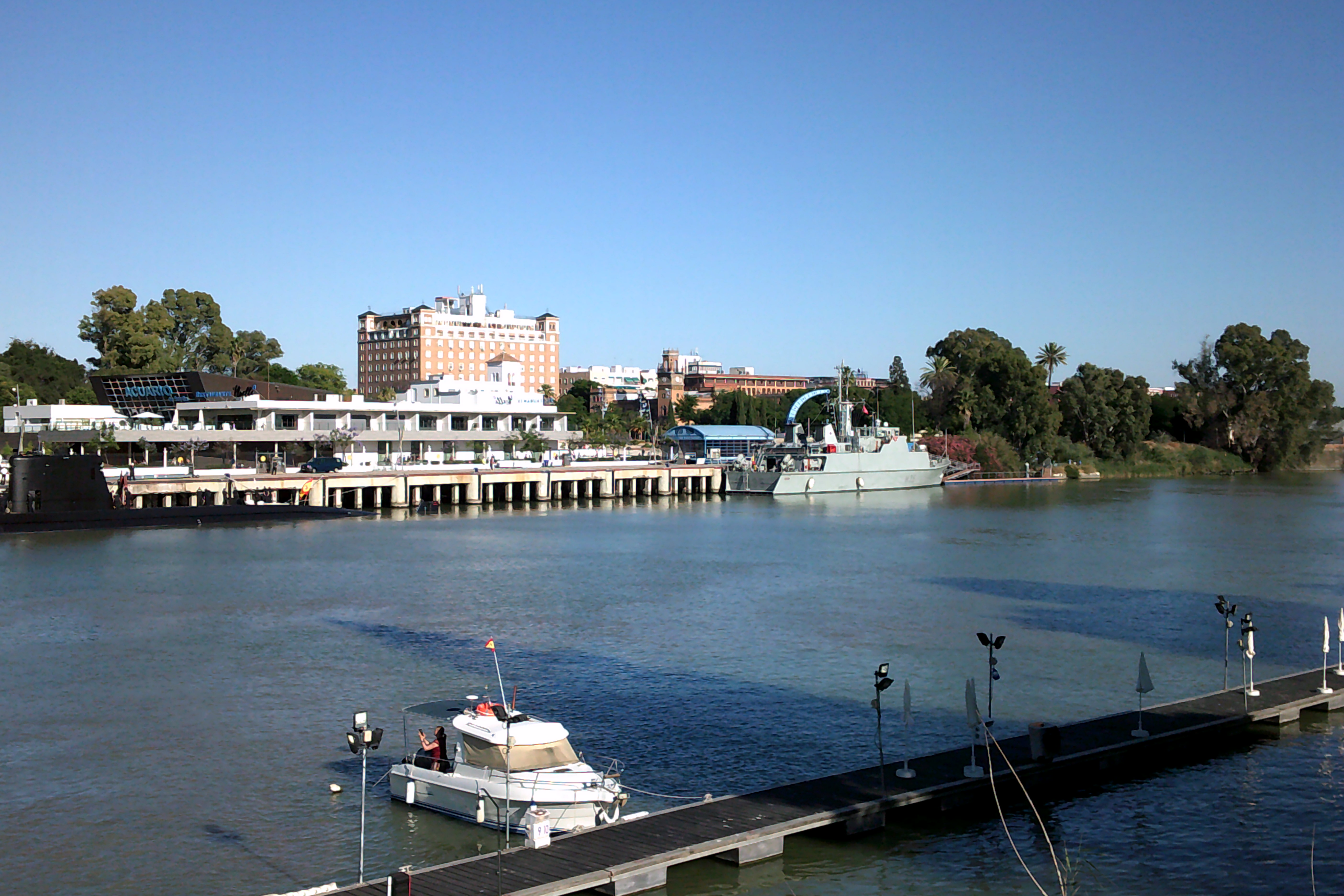 El submarino Tramontana (S-74) y el barco Duero (M-35). Sevilla, Andalucía, España.